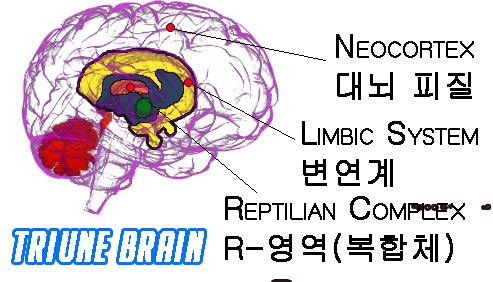 make by Edwards_Allanb Triune Brain